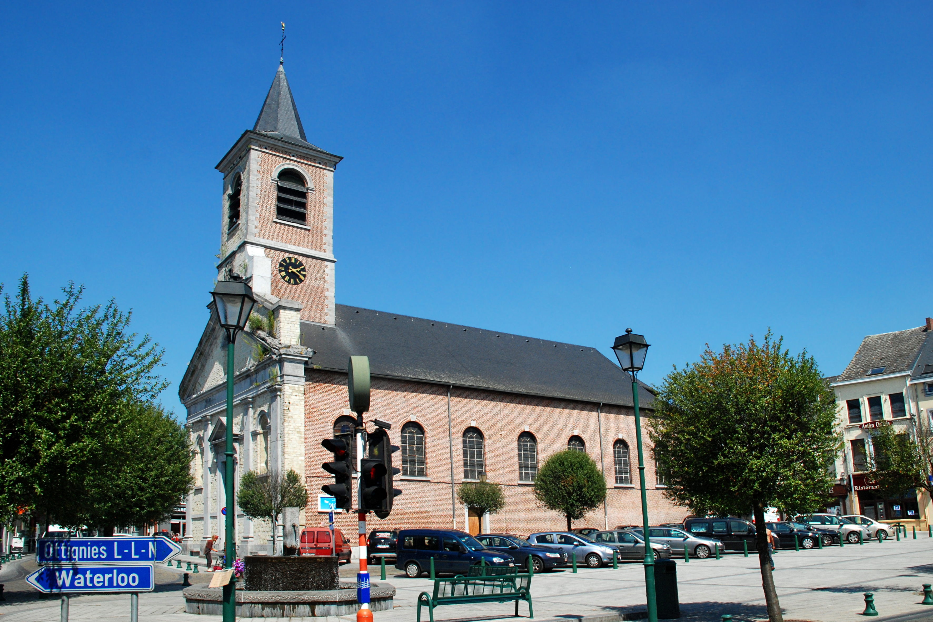 Belgique - Wallonie - Église Saint-Jean l'Évangéliste de Genappe